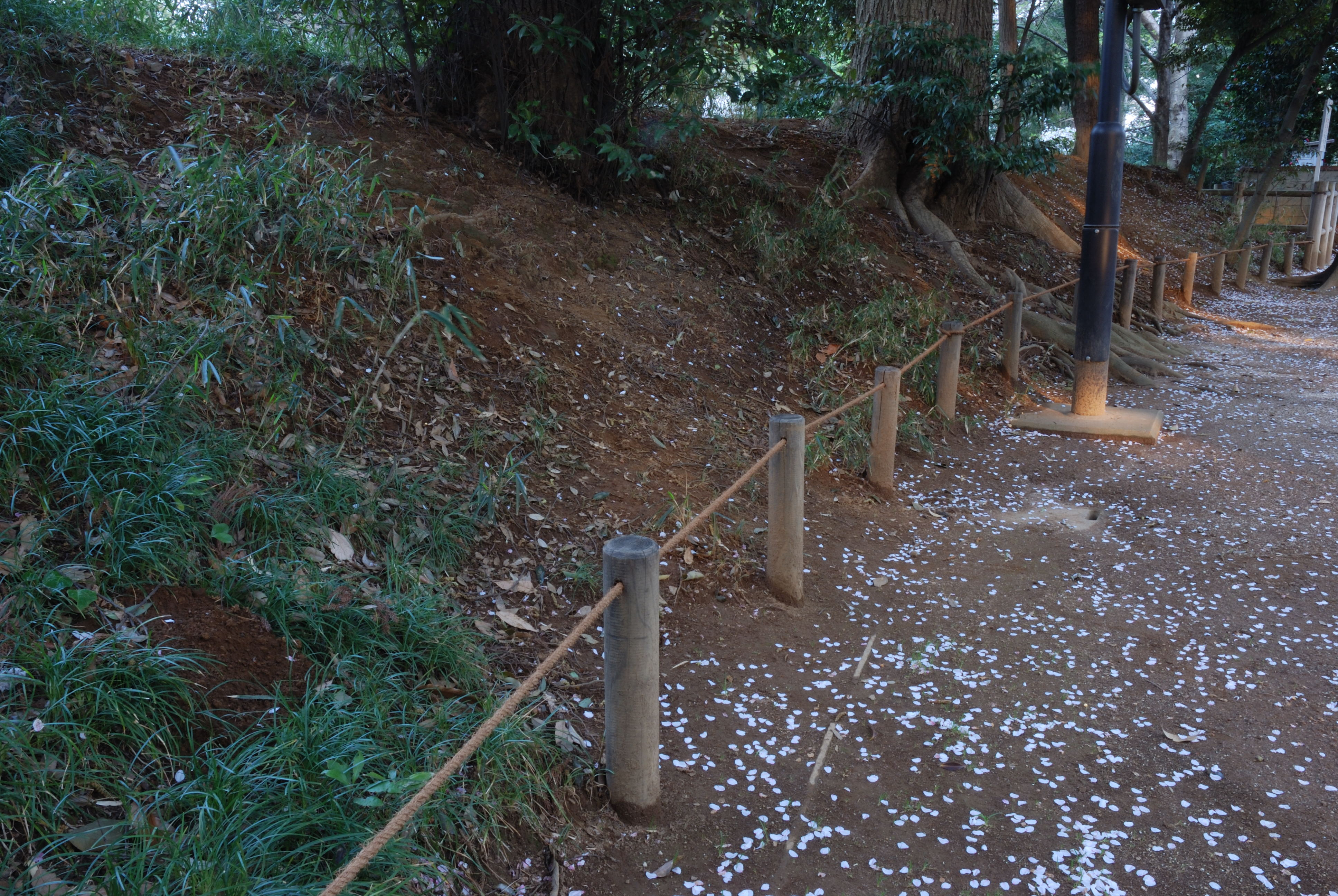 Kogane castle dorui